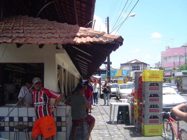 vista-loja-bar-comidas-mercado-casa-amarela-recife